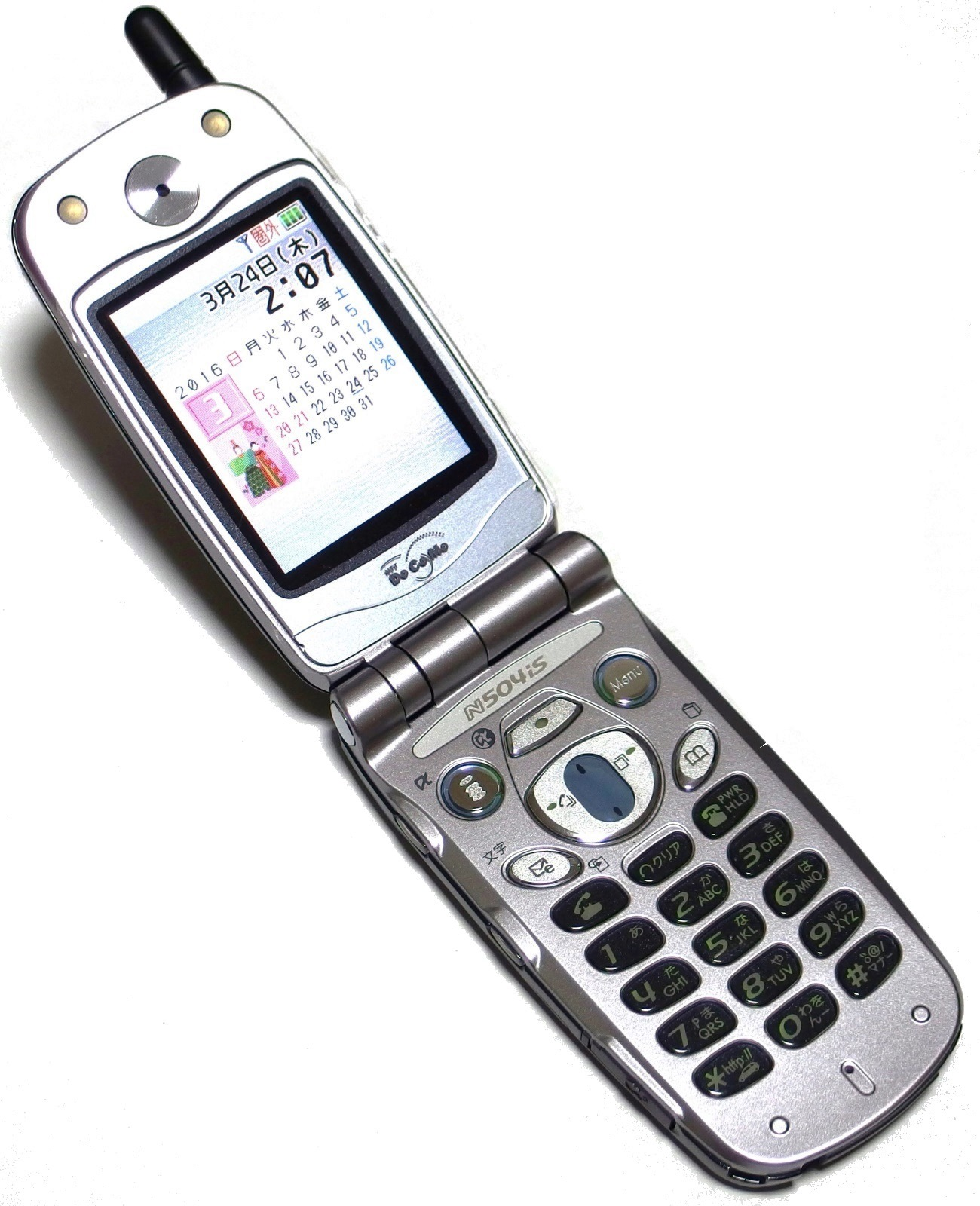 NTT DoCoMo N504iS